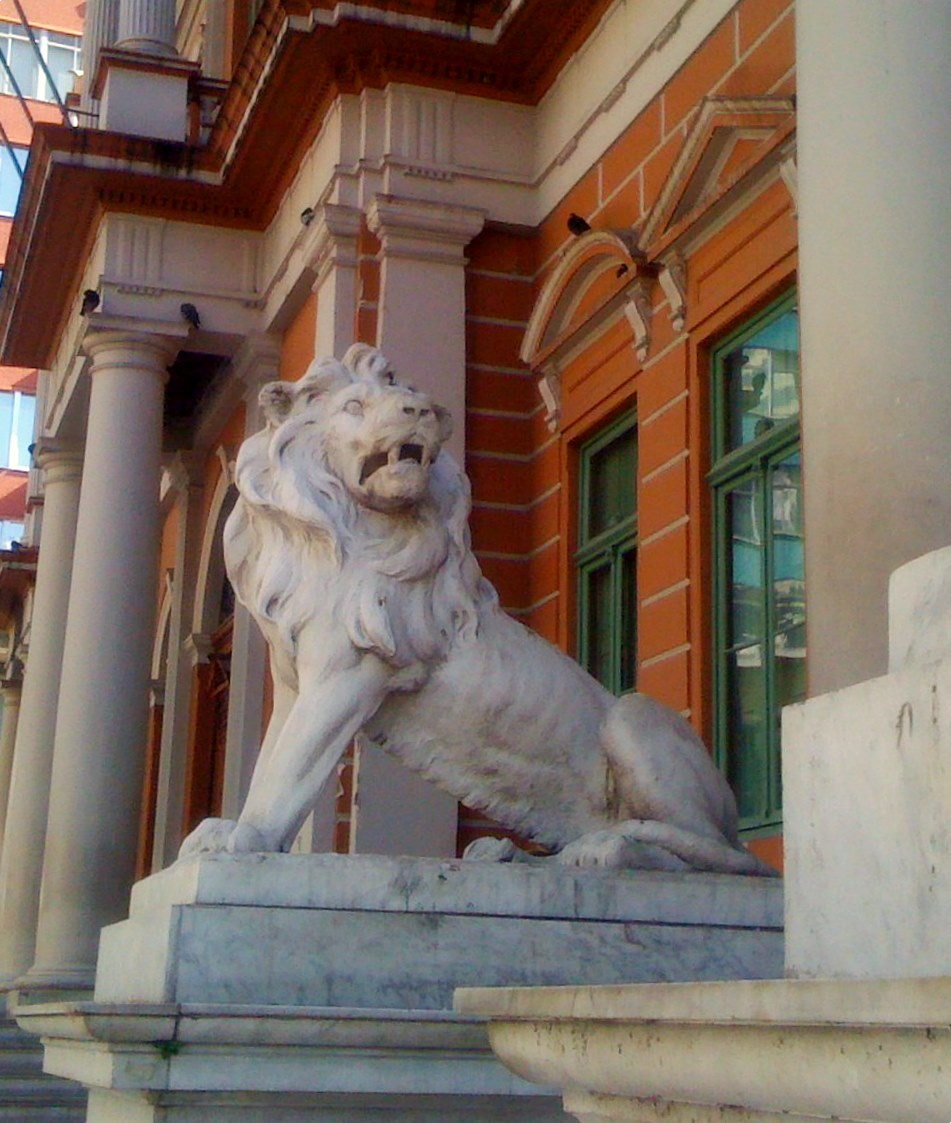 Leão do Prédio da Prefeitura (velha) de Porto Alegre.